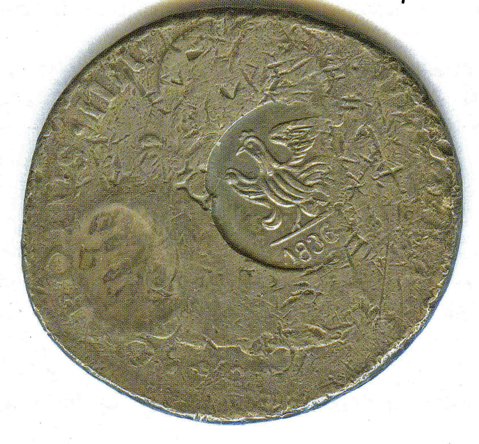 Moneda española empleada en las colonias orientales francesas.